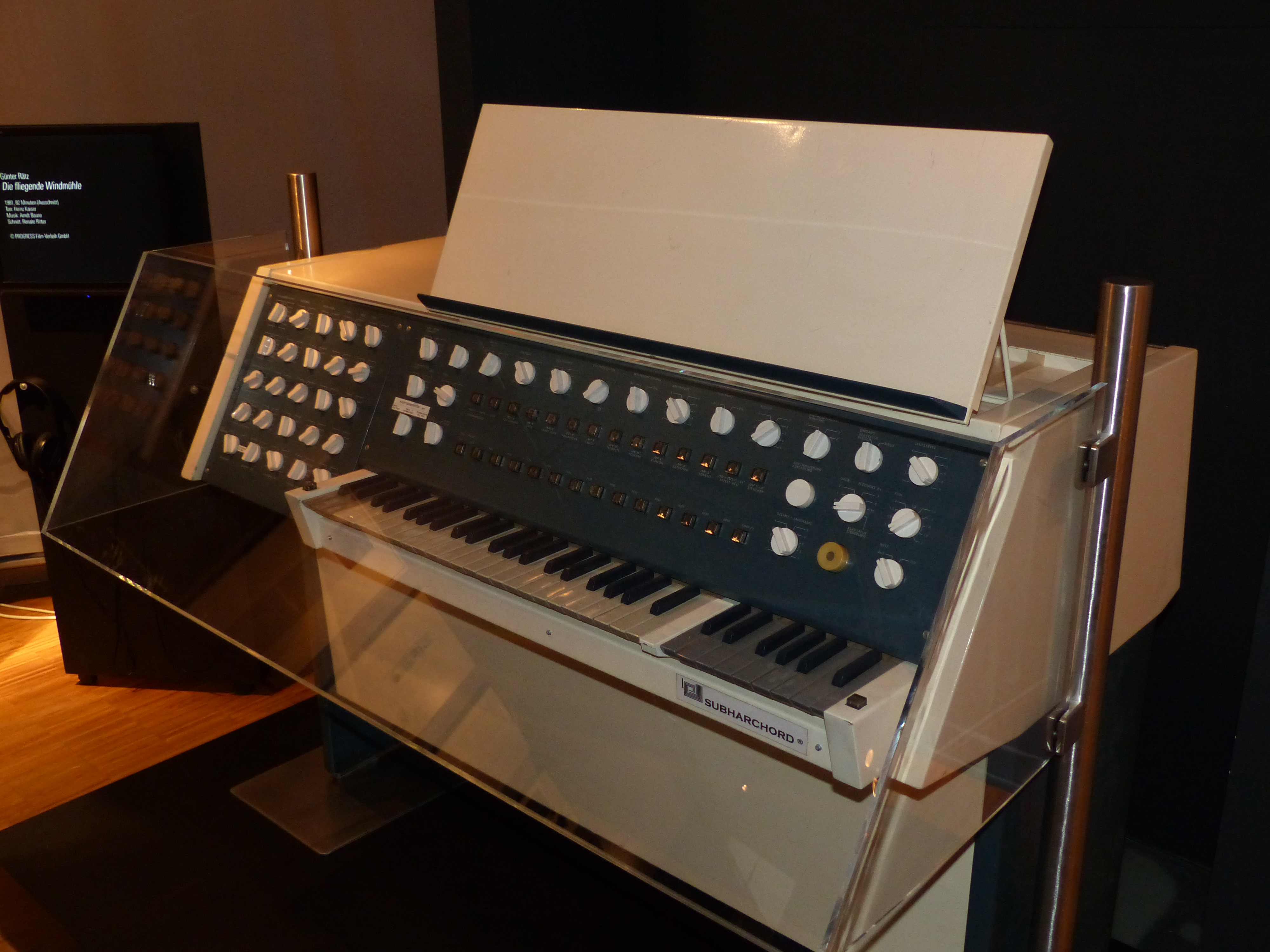 Elektronischer Klangerzeuger Subharchord, 1966, DIAF, in den Technischen Sammlungen Dresden